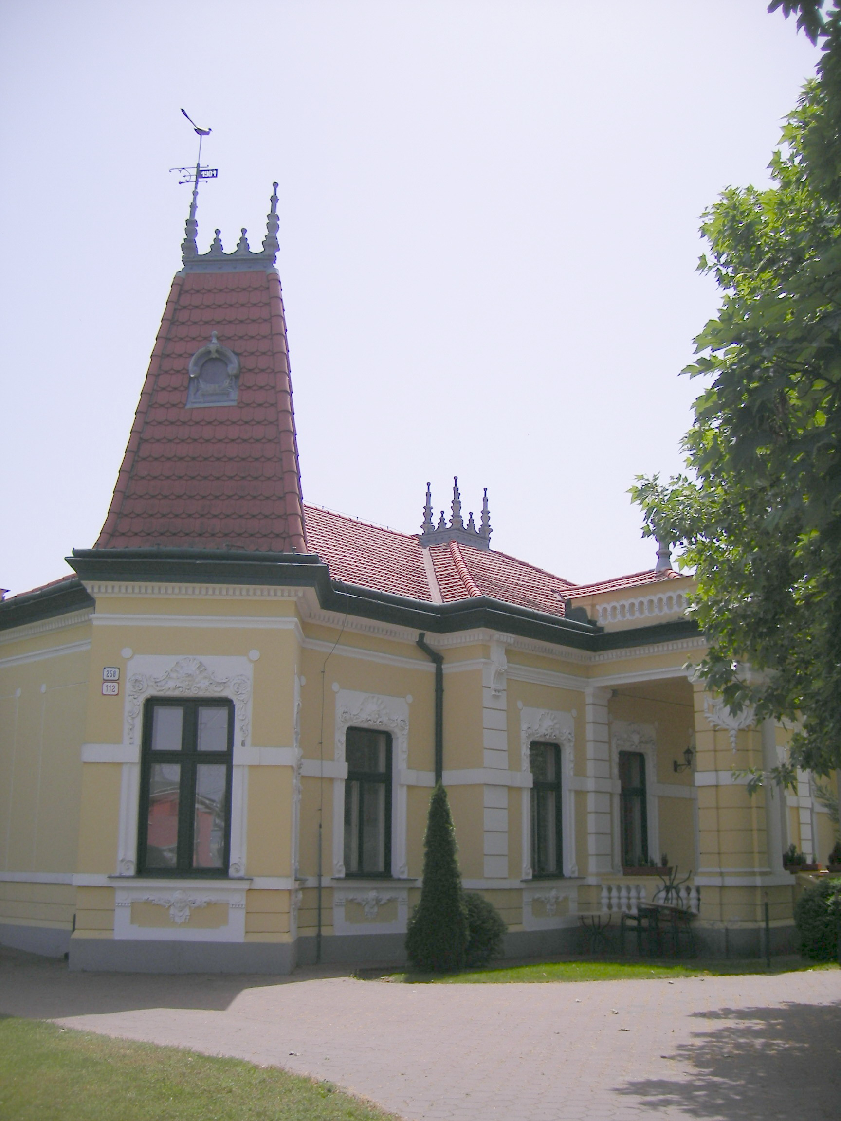 Ógyalla - kastély-étterem